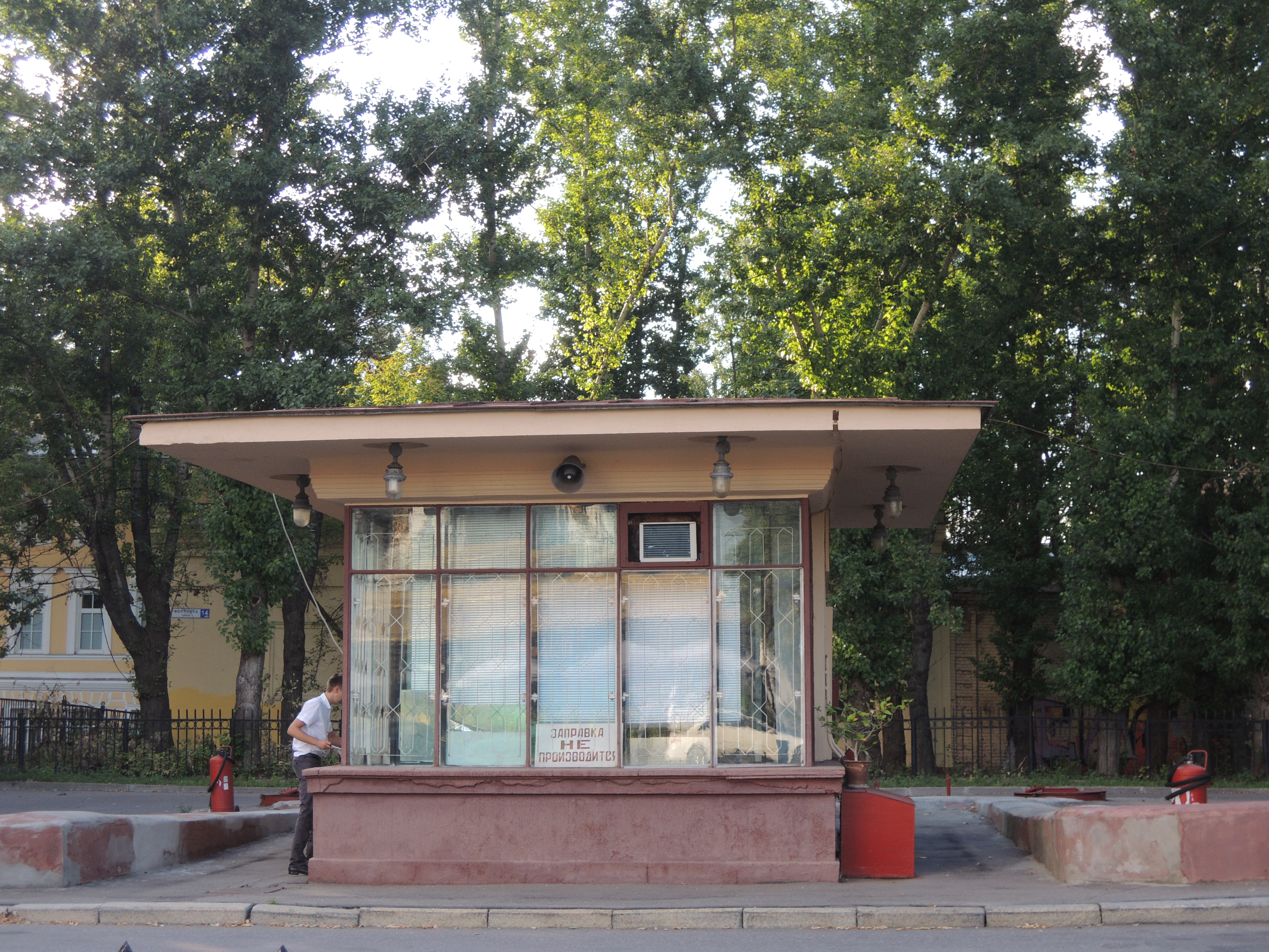 Кремлёвская АЗС на Волхонке